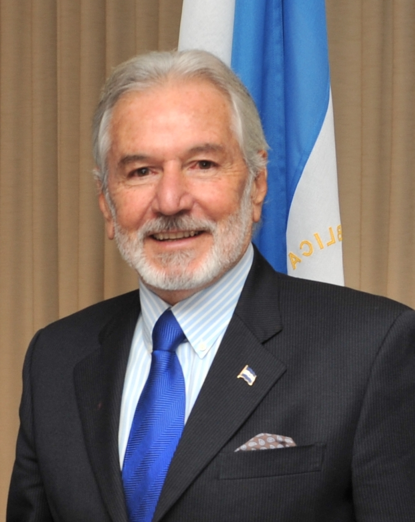 Nicaraguan Foreign Minister Samuel Santos Lopez, 24 November 2010